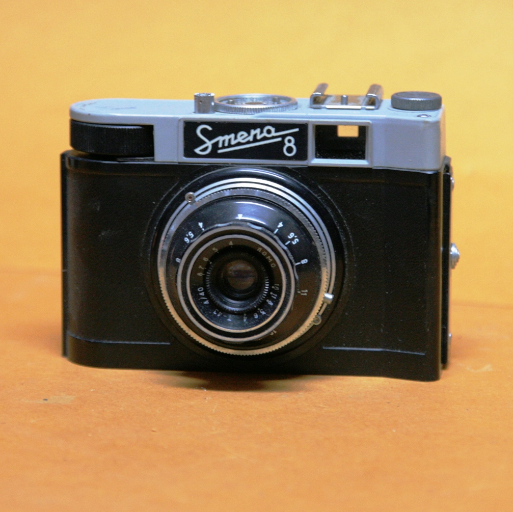 Coll. Marcè CL - LOMO Smena 8 1963 - 1971